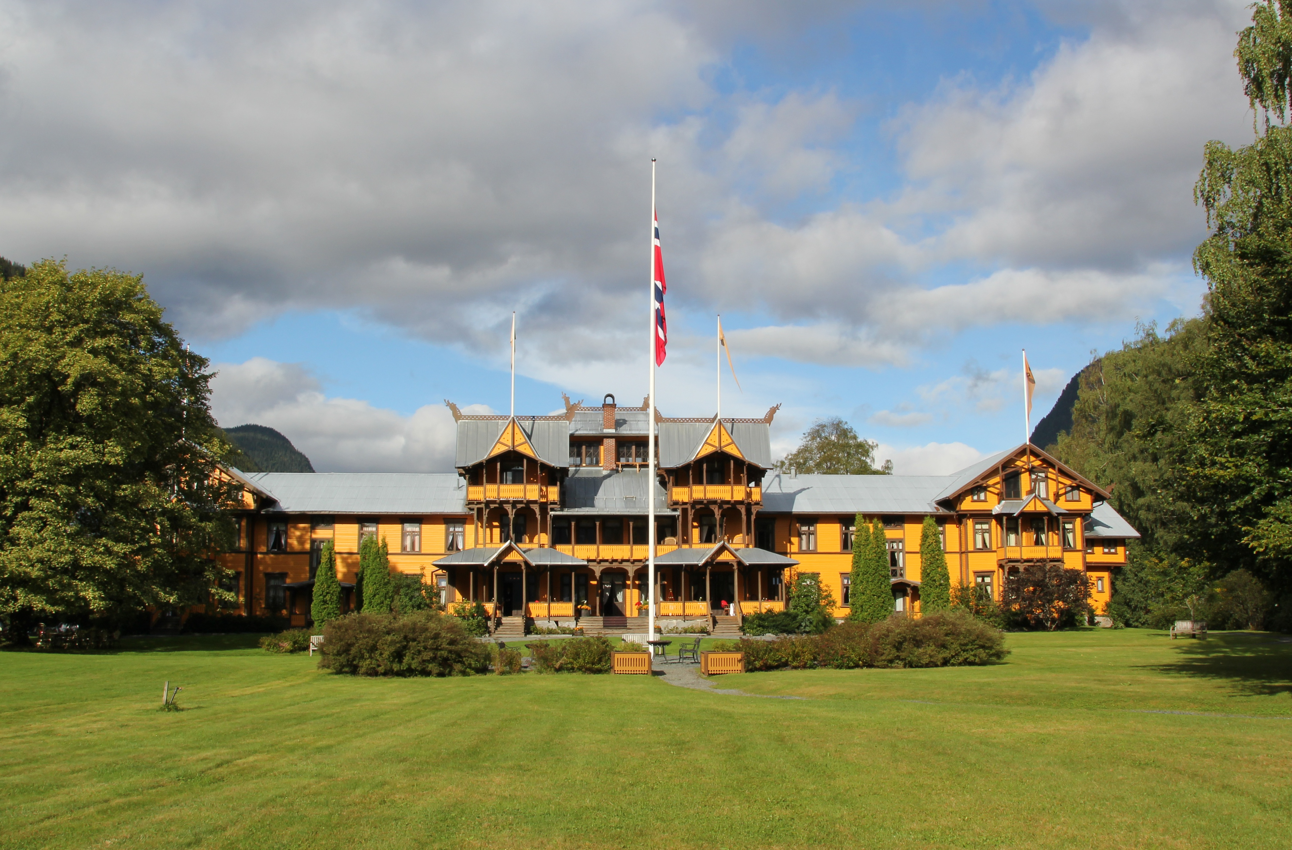 Dalen Hotel 2011